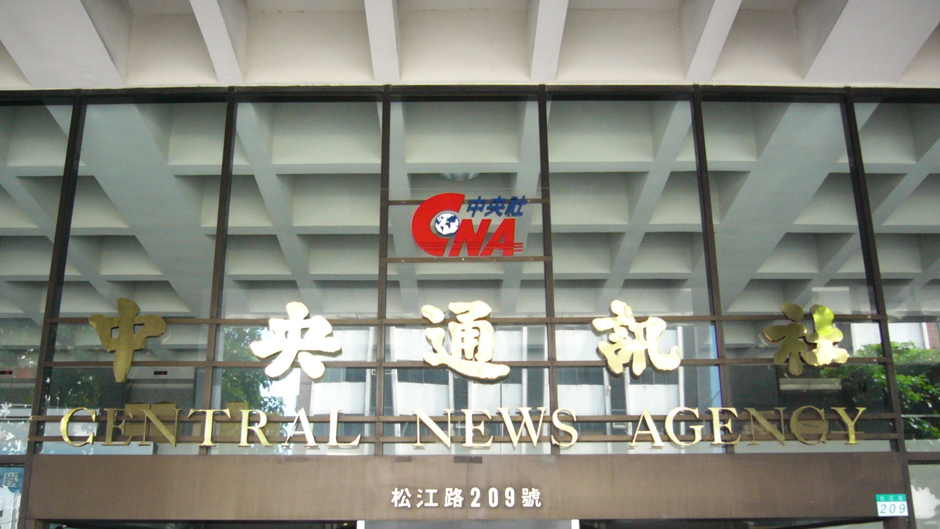 中文（台灣）: 志清大樓左大門上的中央通訊社商標。